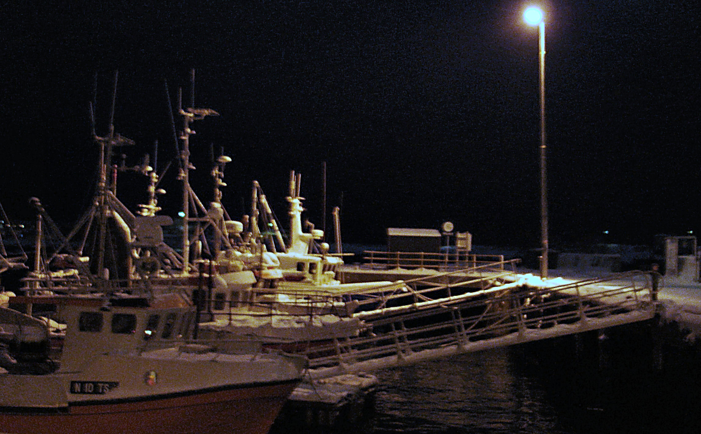 26 februari 2005. Vissersboten liggen klaar voor het nachtelijk uitvaren.